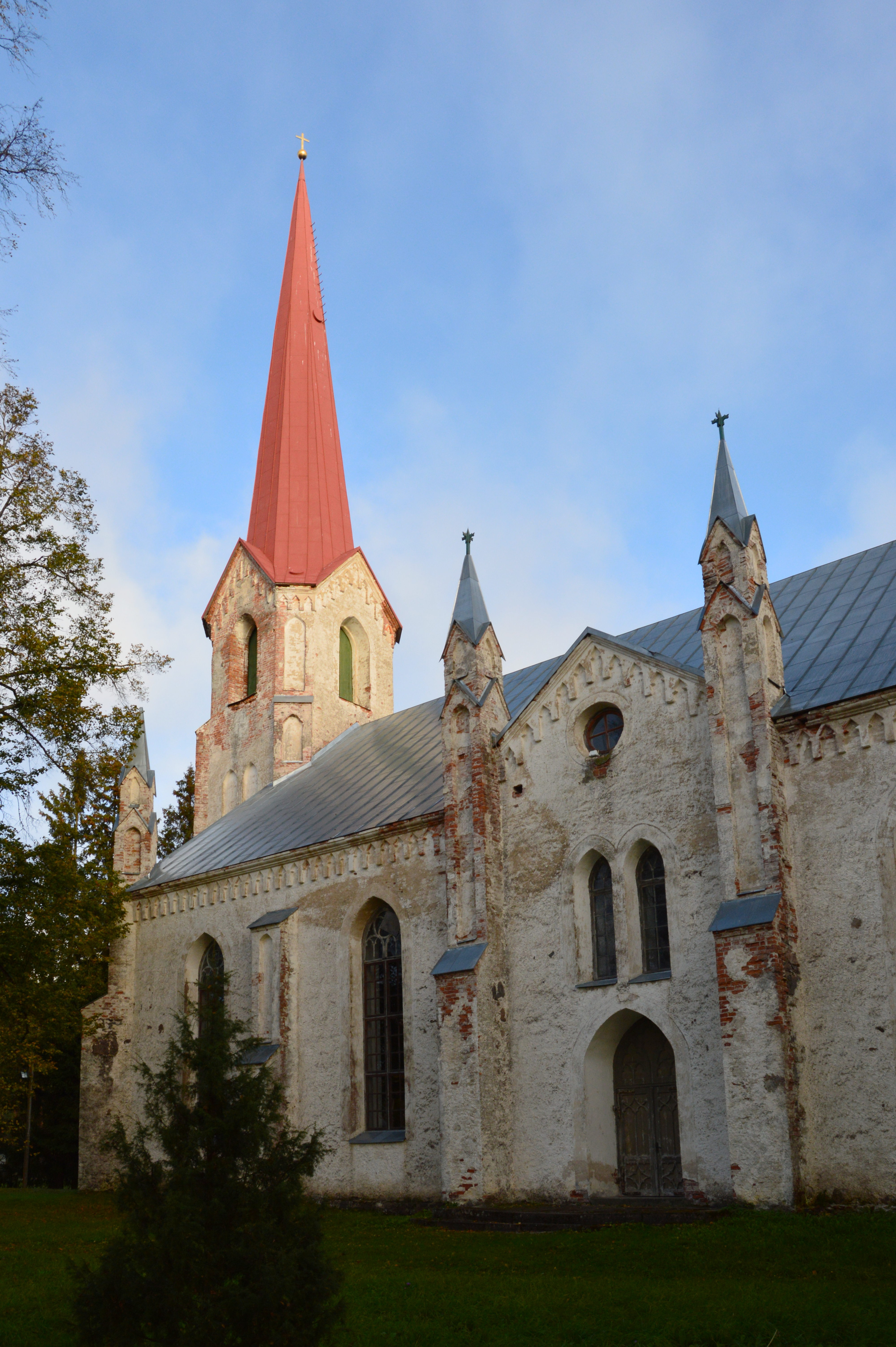 Lohusuu kirik